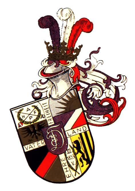 Wappen der Leipziger Burschenschaft Dresdensia